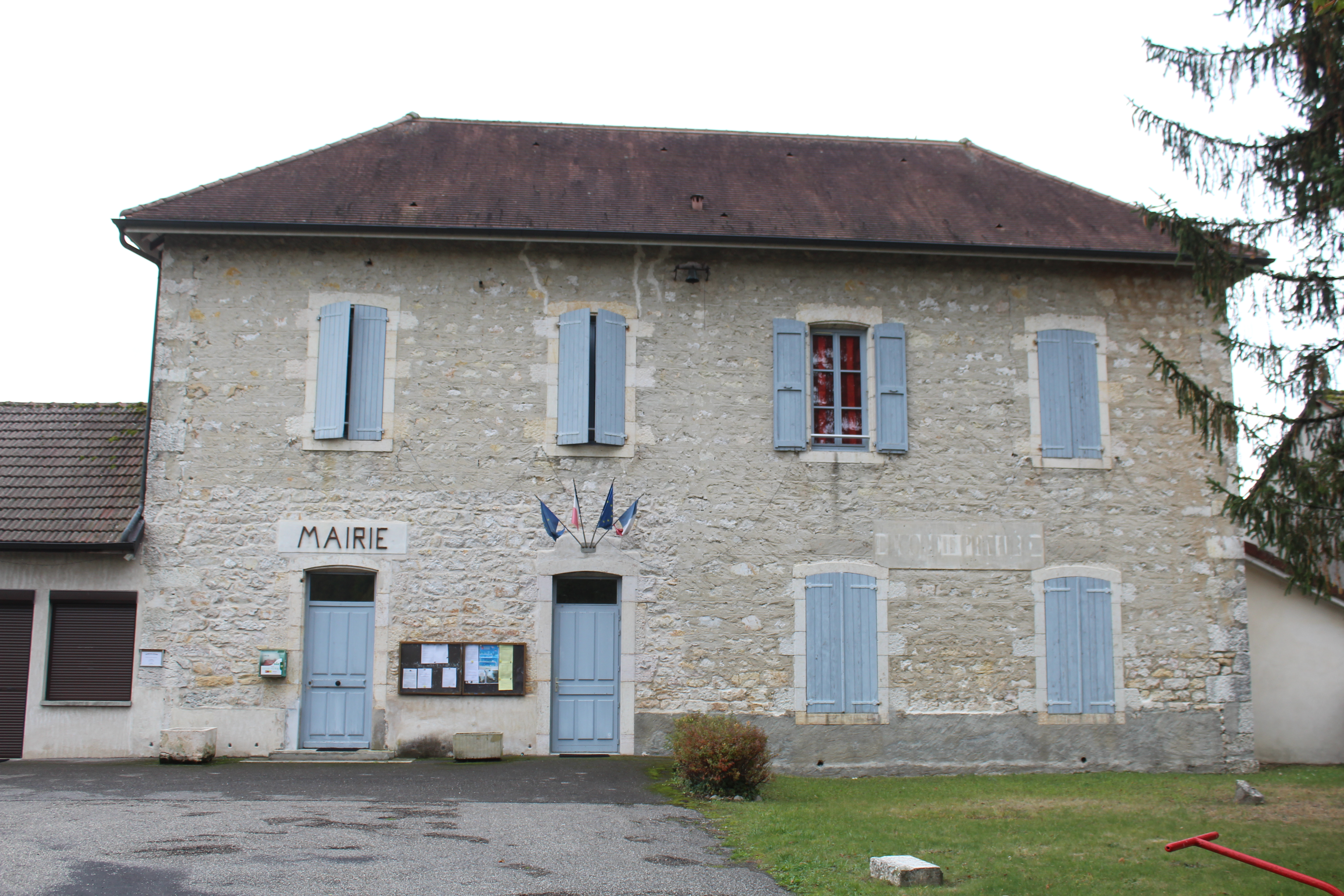 Mairie de Lavours.